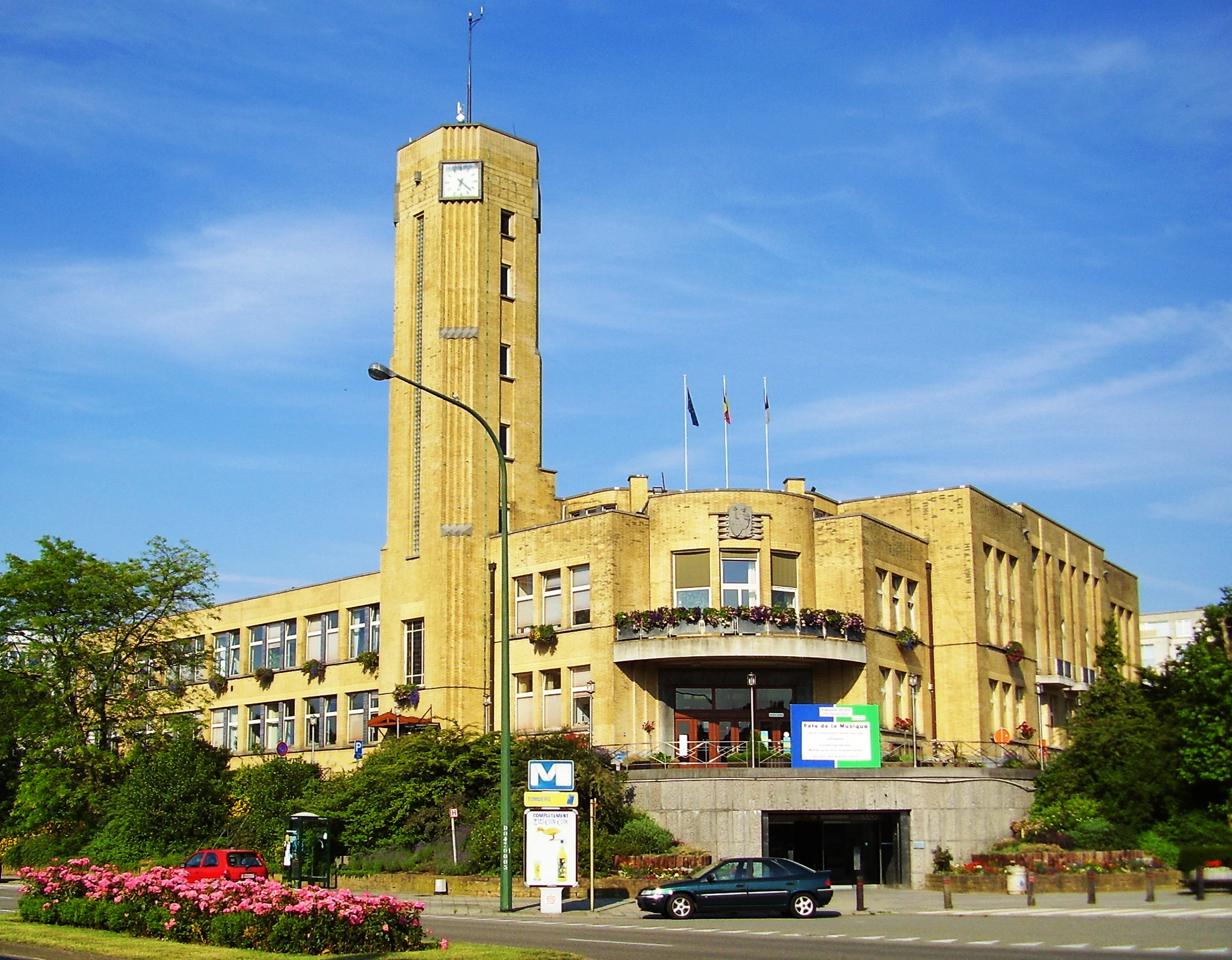 Maison communale de Woluwe-Saint-Lambert (Bruxelles), architecte: Joseph Diongre